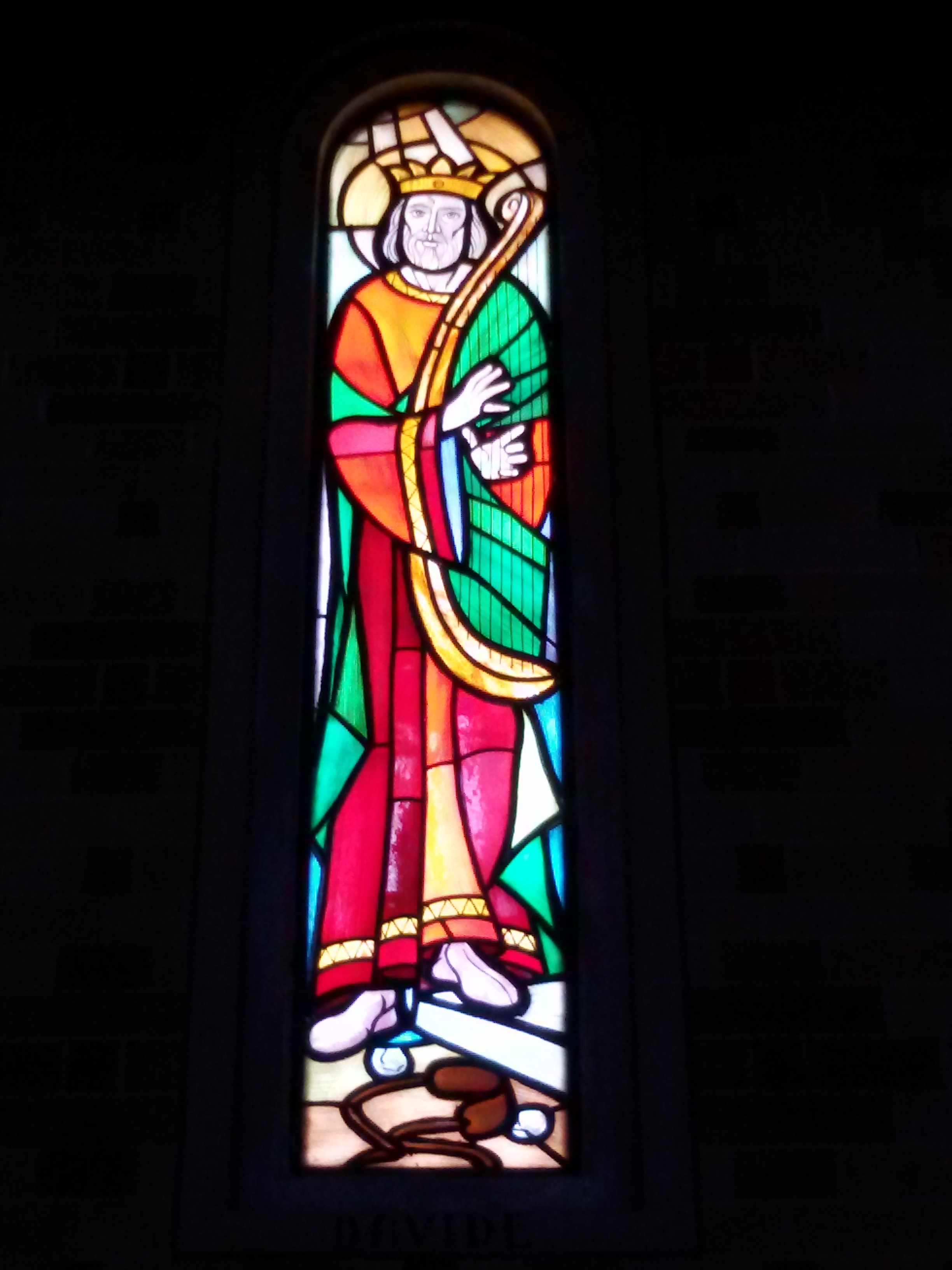 vetrata